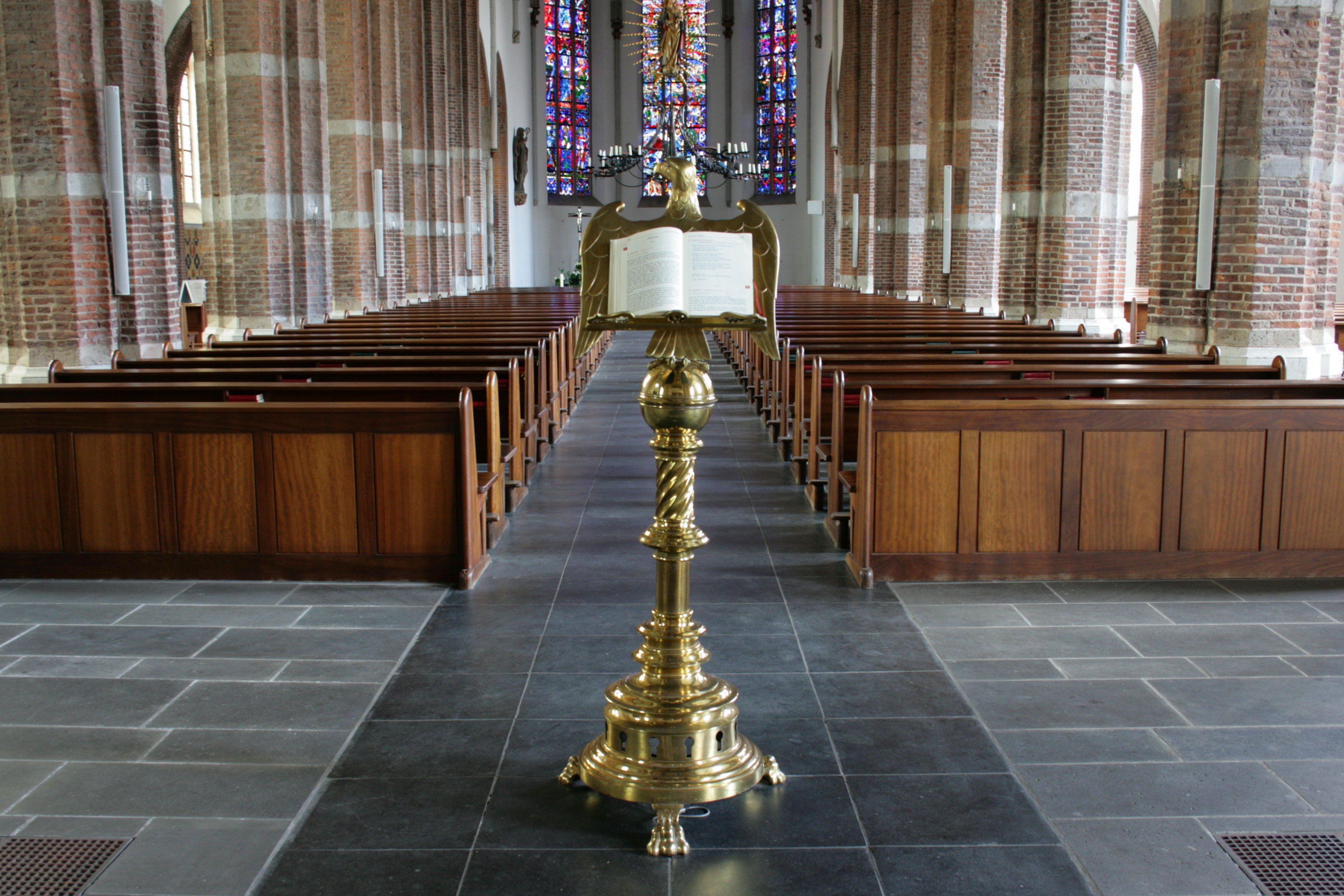 Sankt Aldegundis in Emmerich am Rhein